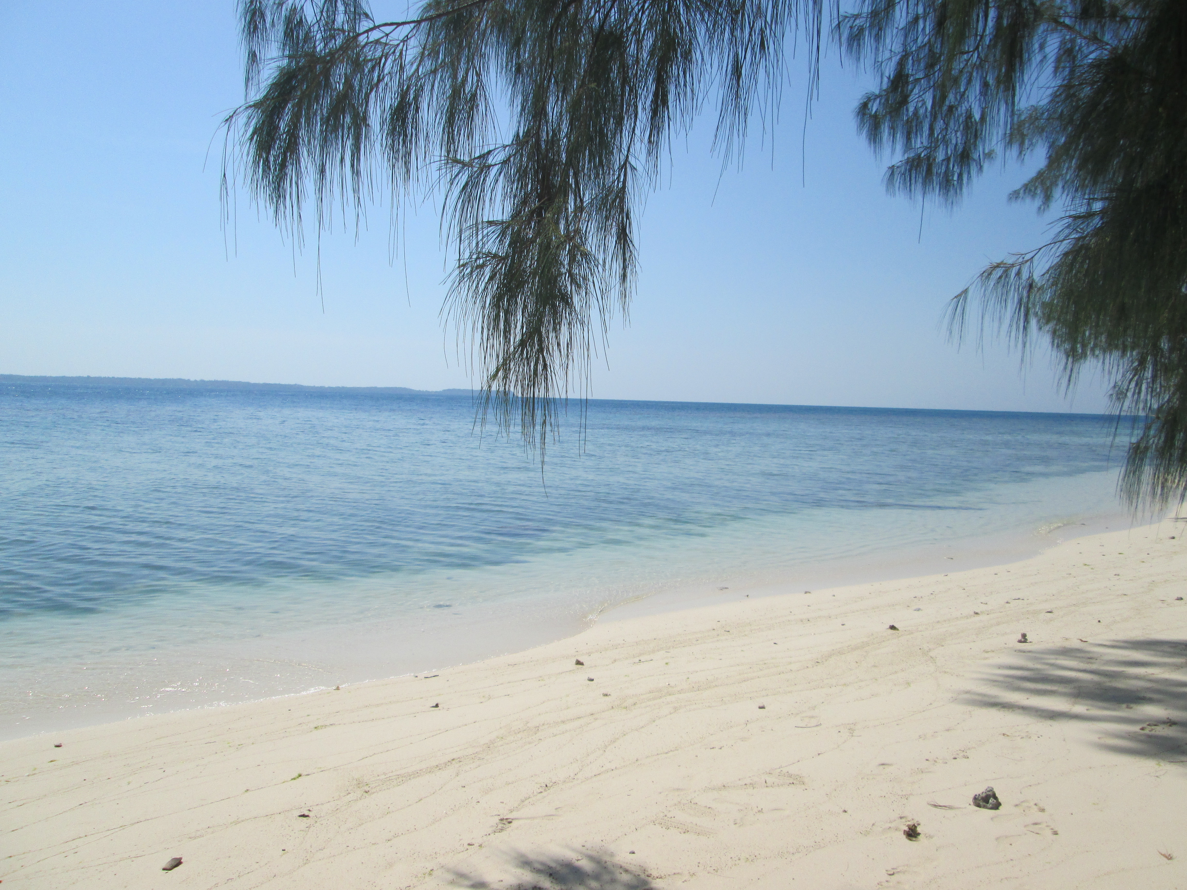 Unnamed Road, Kemujan, Karimunjawa, Kabupaten Jepara, Jawa Tengah, Indonesia